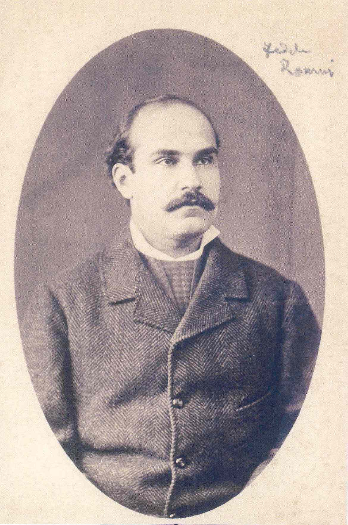 Gianfrancesco Nardi (Teramo 1833-1903), immagine acquisita da stampa originale, stampa all'albumina, opera il cui autore è morto da più di 70 anni, acquisita da scanner